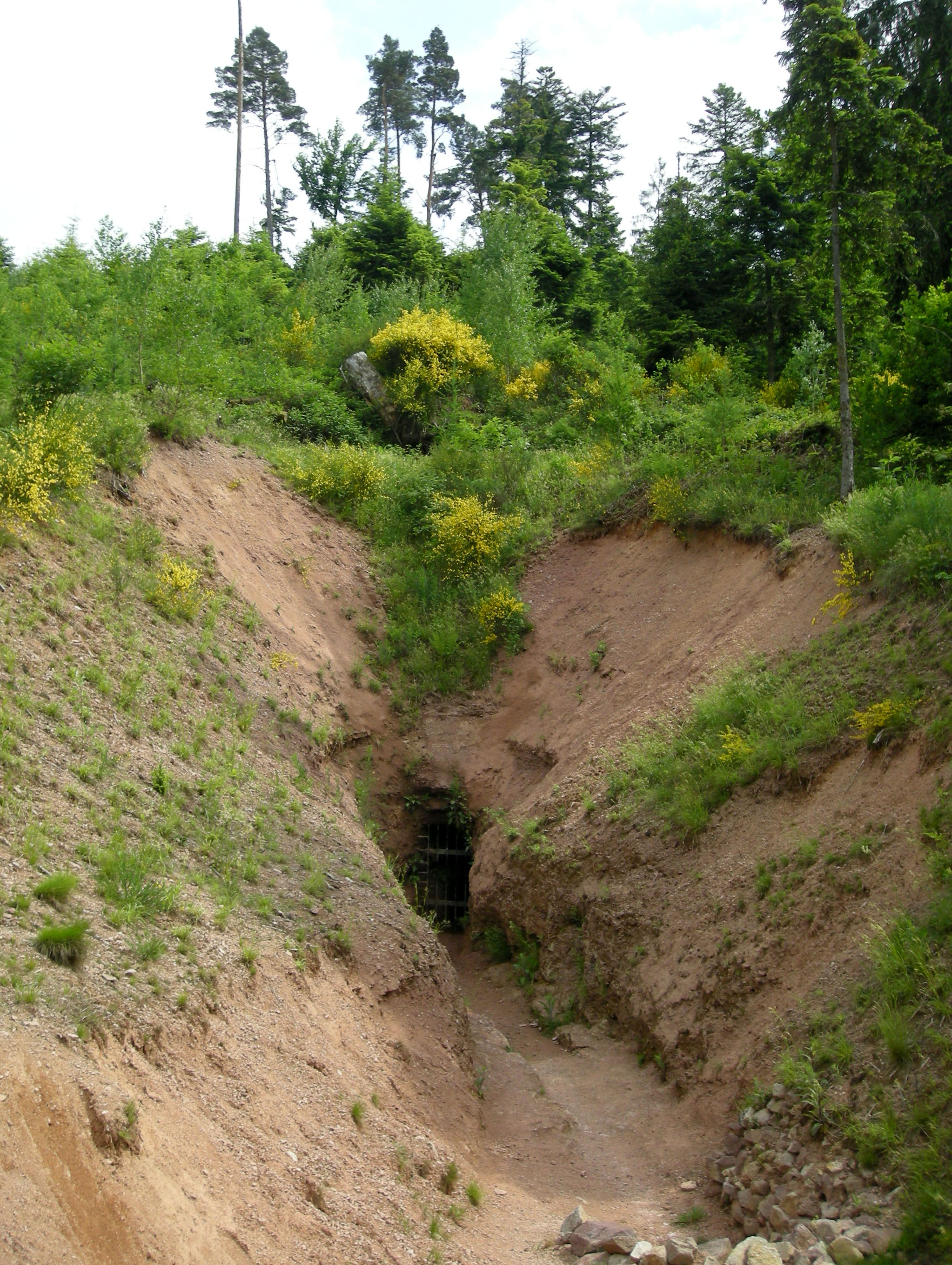 Dégagement d'une galerie à l'ancienne mine de cuivre de Saint-Jean d'Anozel (Saulcy-sur-Meurthe, Vosges)